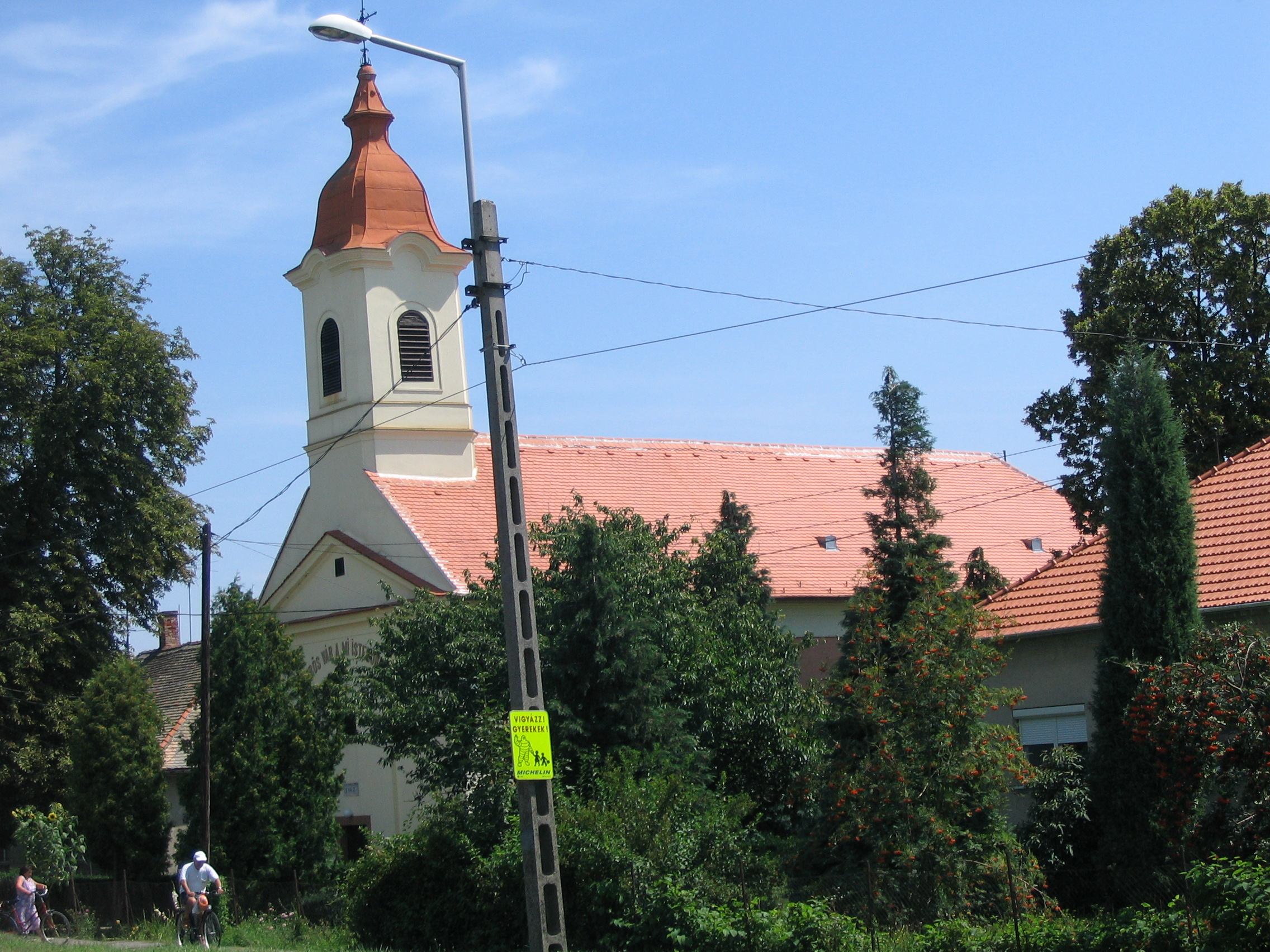 Farádi evangélikus templom